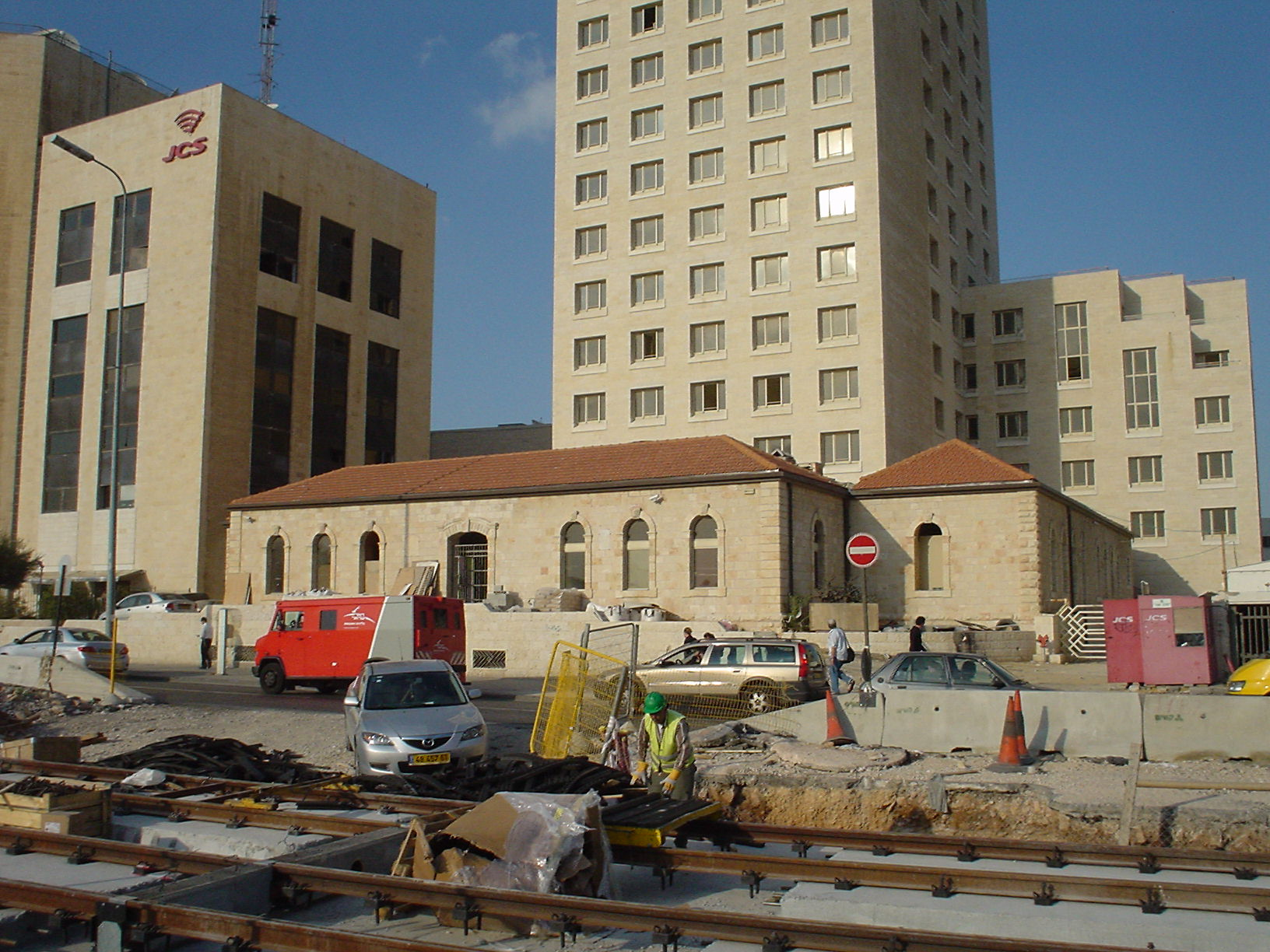 בית הזקנים הספרדי רחוב יפו ירושלים, מבט לכוון מערב